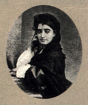 Marie Bracquemond (1840 - 1916), French painter